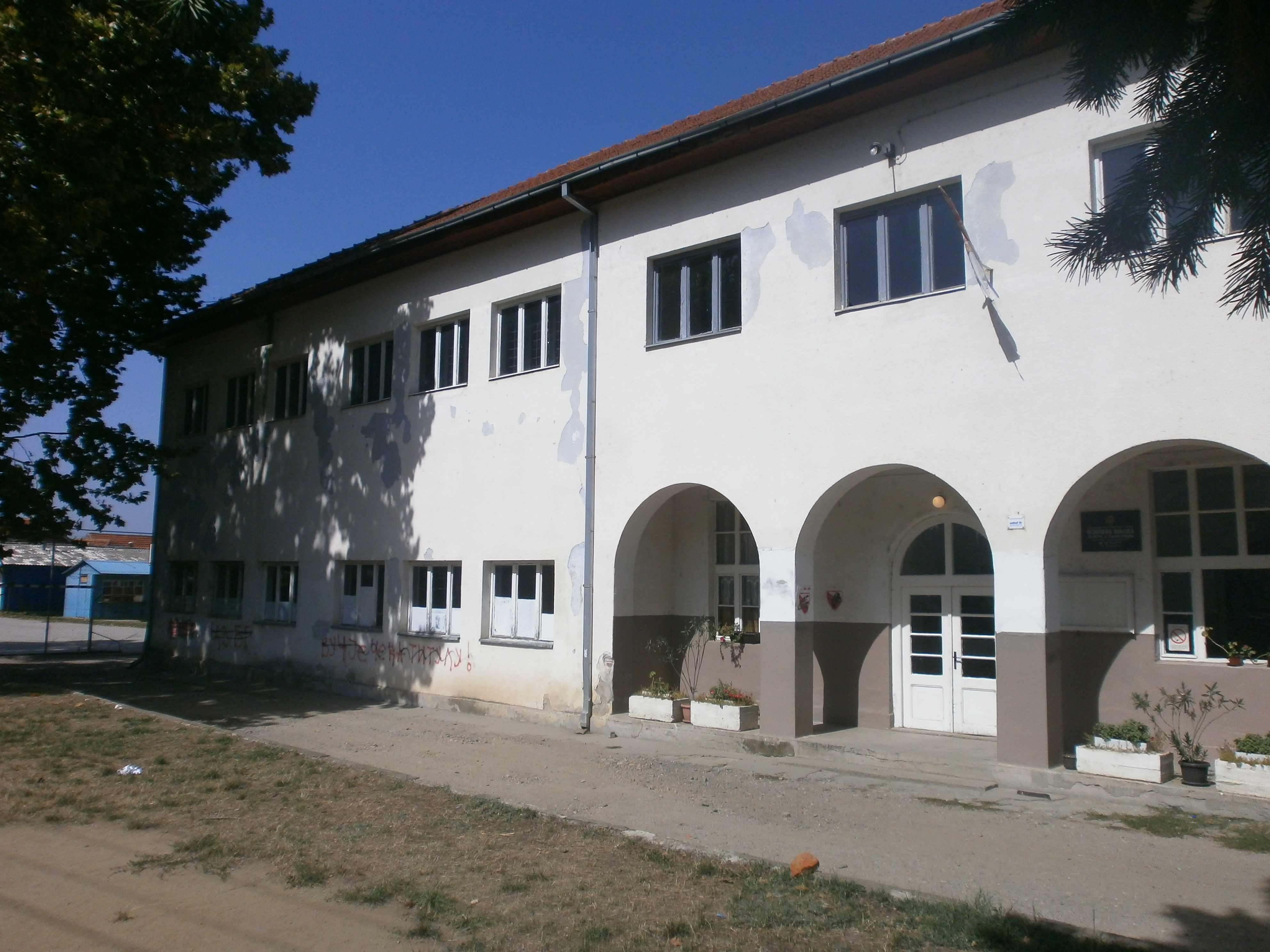 Srpski (latinica): Vučje, Leskovac